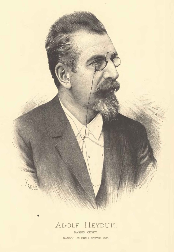 Adolf Heyduk. Portréty českých osobností od Jana Vilímka